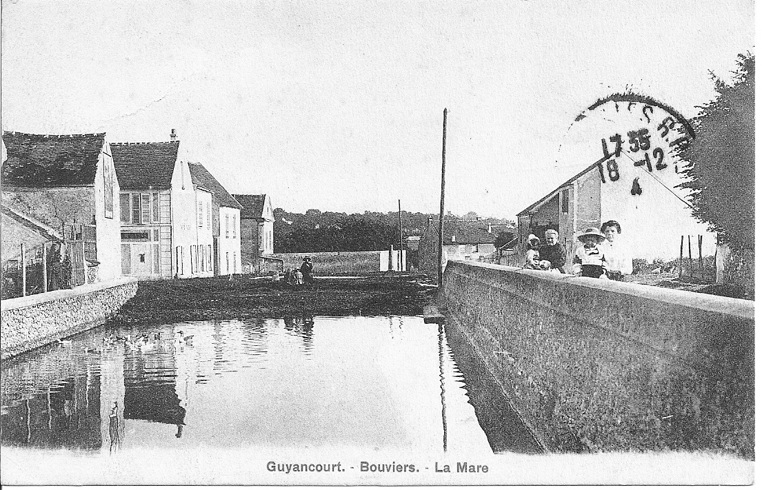 Carte Postale